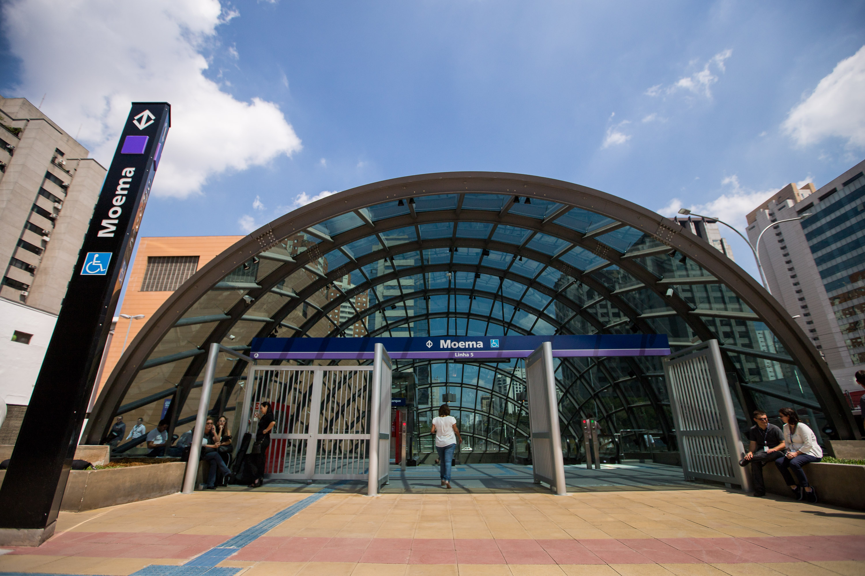 O Governador do estado de São Paulo, Geraldo Alckmin, a estação Moema, da Linha 5–Lilás do Metrô. Com mais um quilômetro de trilhos, a chamada ‘Linha da Saúde’ passará a contar com 16,2 km de extensão e 12 paradas, desde o Capão Redondo. A rede metroviária de São Paulo terá agora 84,3 quilômetros e 75 estações.Data: 05/04/2018Local: Itapeva/SPFoto: Governo do Estado de São Paulo